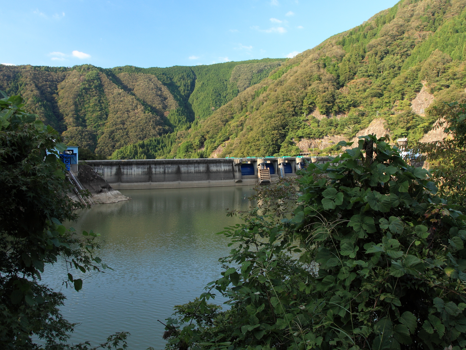 豊田市閑羅瀬町、2011年